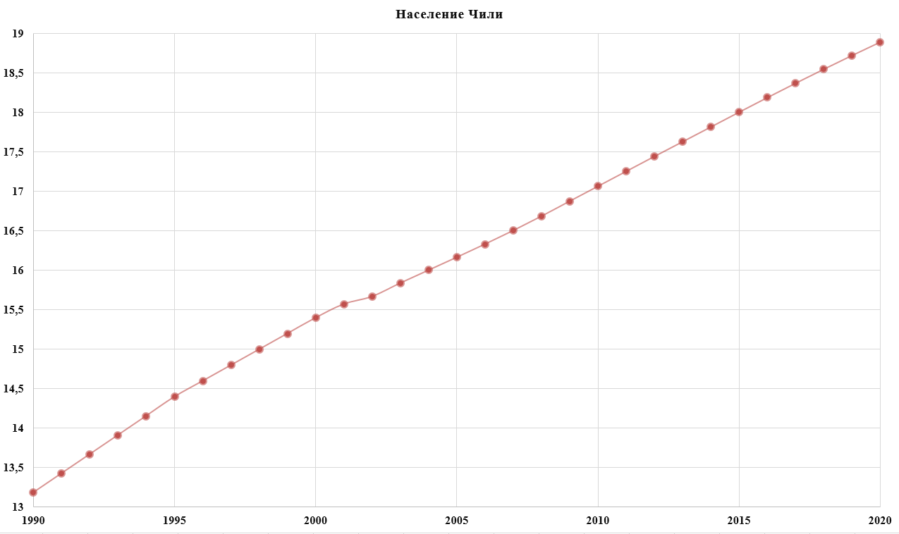 Население Чили